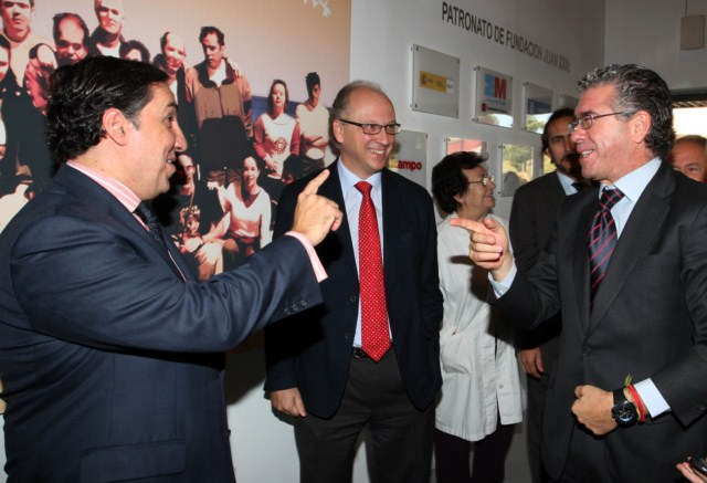 Francisco Granados y los candidatos al Congreso Congreso Gabriel Elorriaga y José Ramón García visitan la Fundación Juan XXIII